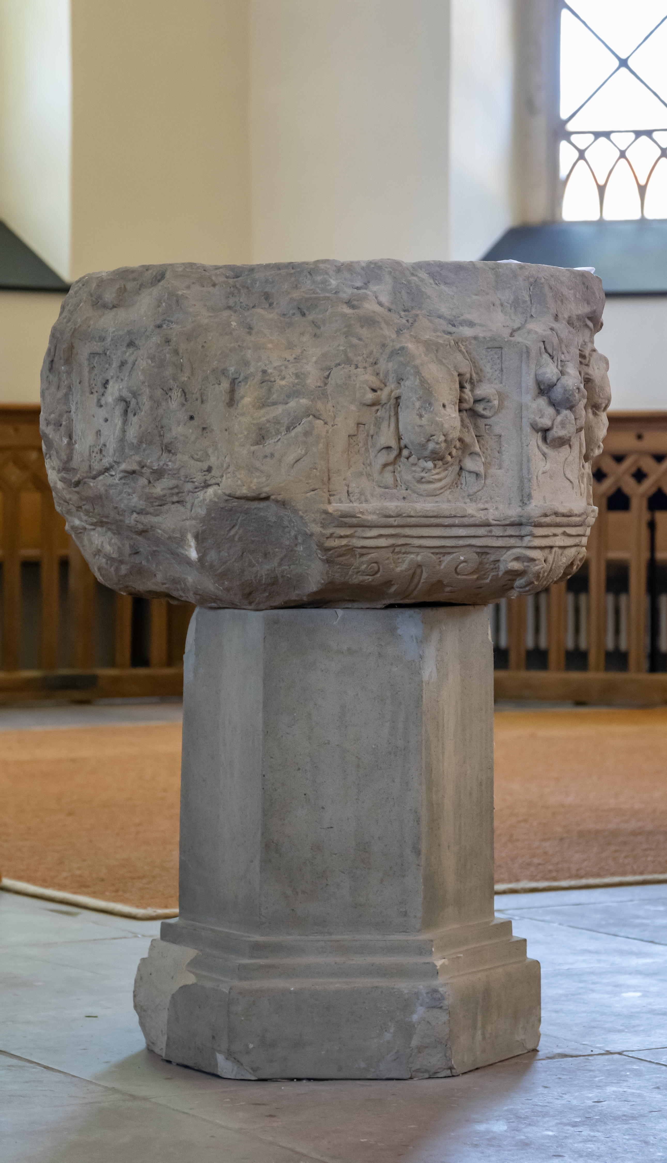 Evangelisch-reformierte Kirche in Dörentrup-Bega; vorreformatorisches Taufbecken